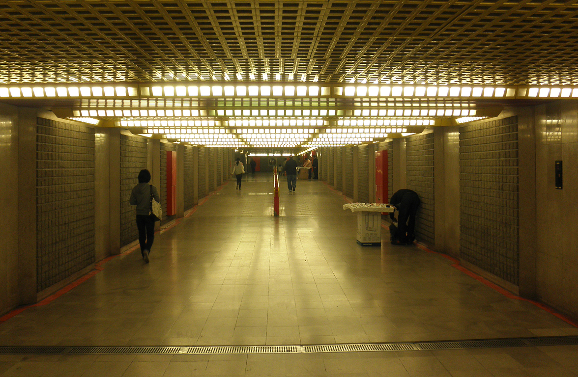 Stazione di San Donato della metropolitana di Milano, corridoio di collegamento con l'autostazione.